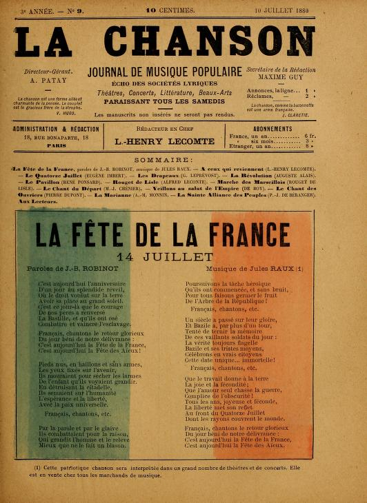 Couverture tricolore de La Chanson du 10 juillet 1880.